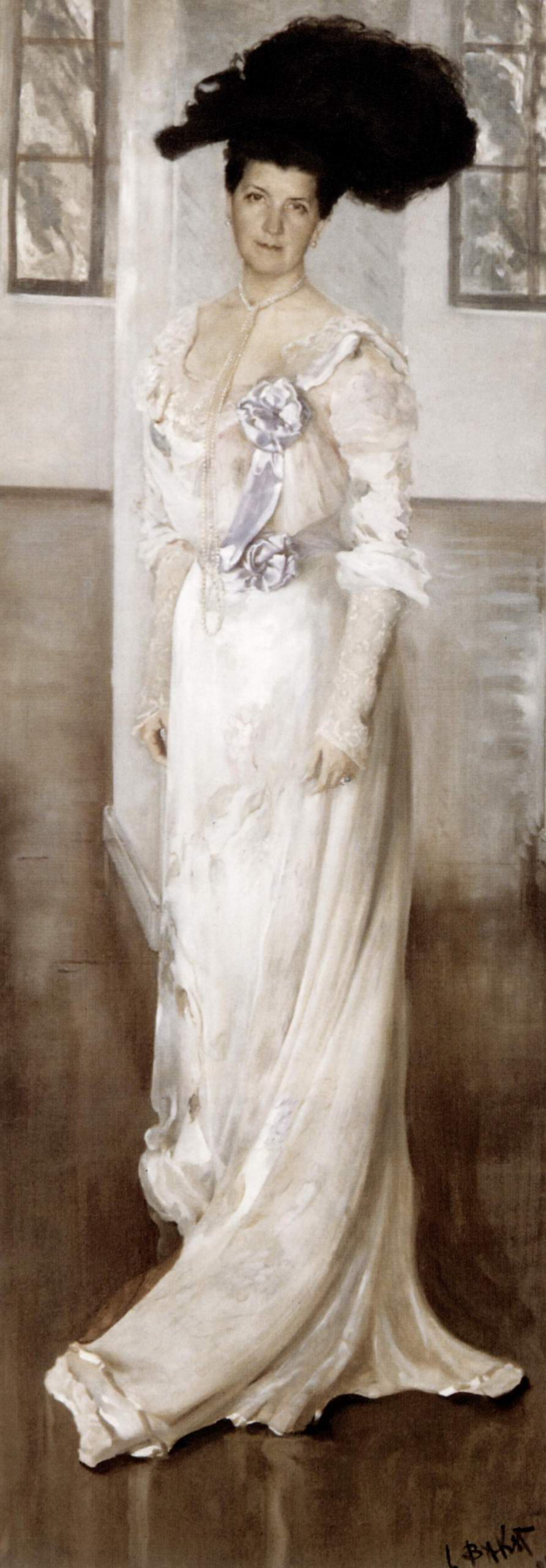 Портрет графини Марии Александровны Келлер, ур. Шаховской (1861—1944)